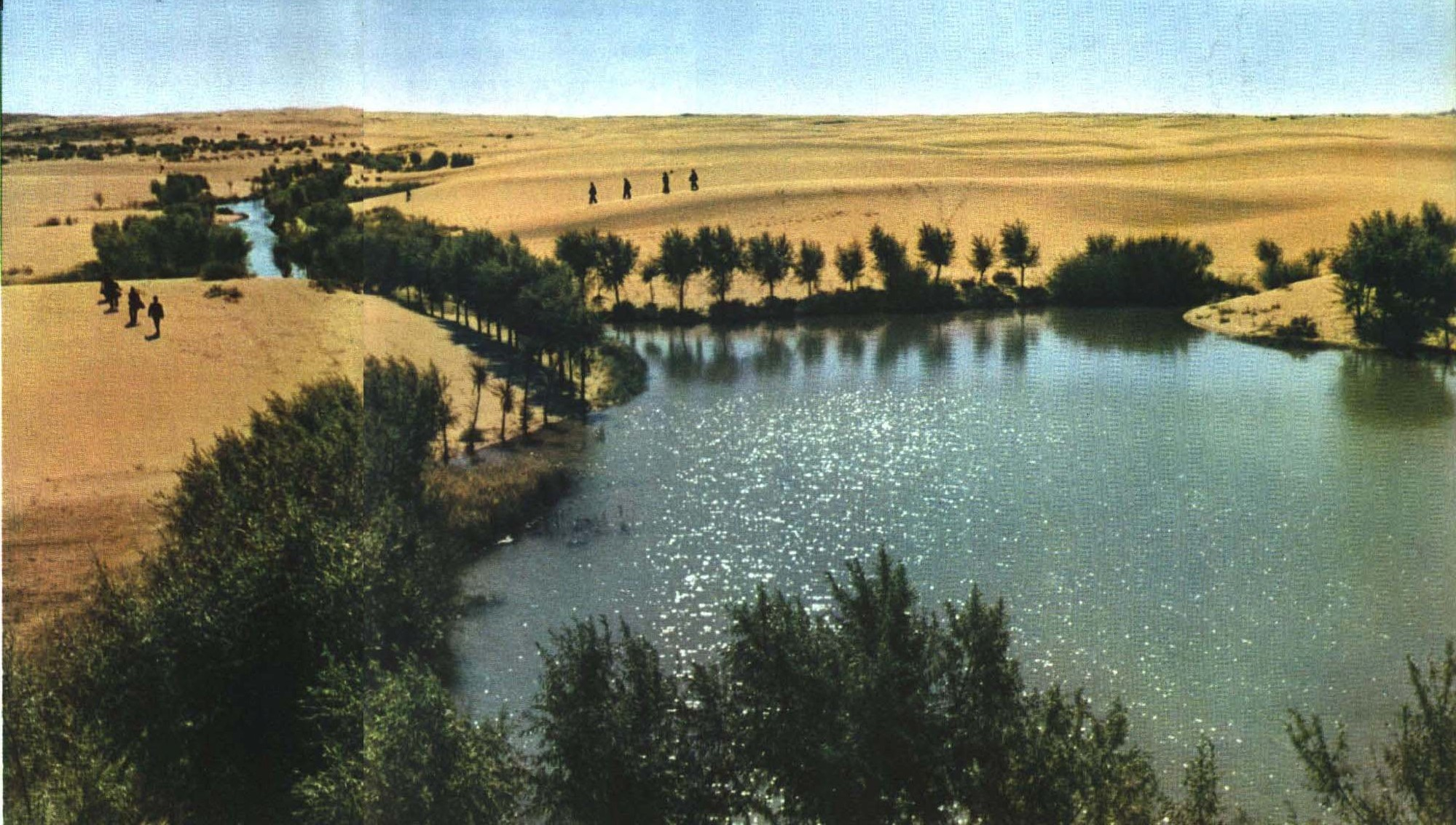 1964-07 1964年 治理十年后的陕西毛乌苏沙漠